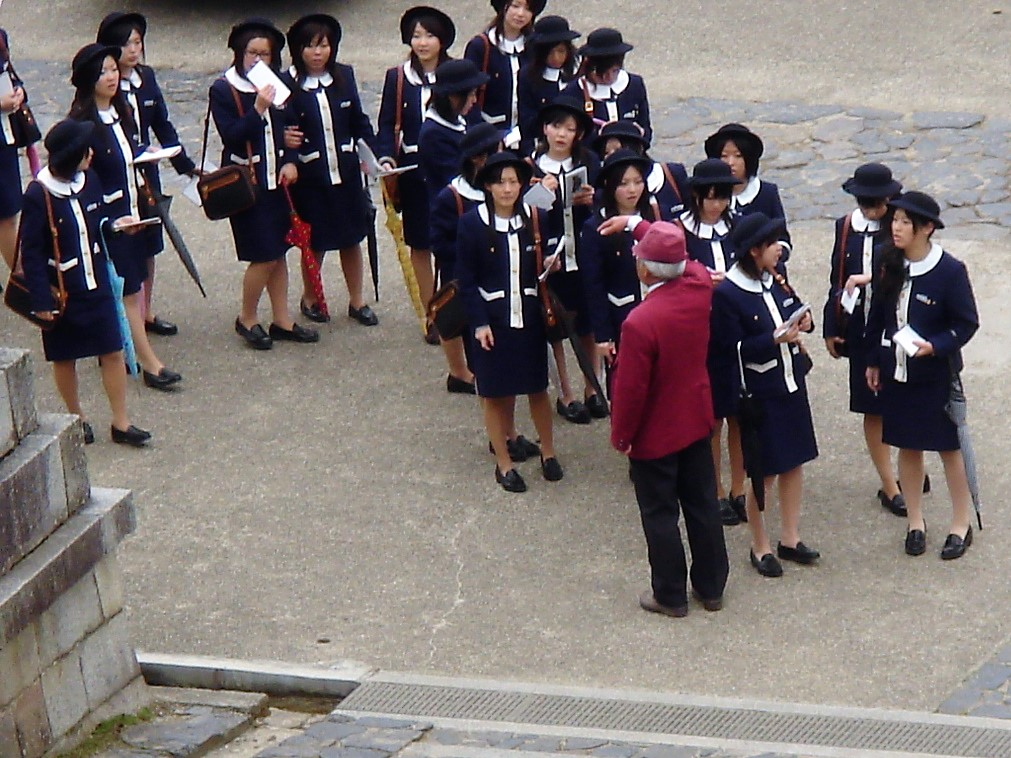 Schulung einer größeren Gruppe von Gästeführerinnen (engl. Tour guides) in der japanischen Großstadt Nara. Die Gästeführerinnen werden für den Einsatz bei Busrundfahrten geschult und tragen obligatorische „Uniformen“.